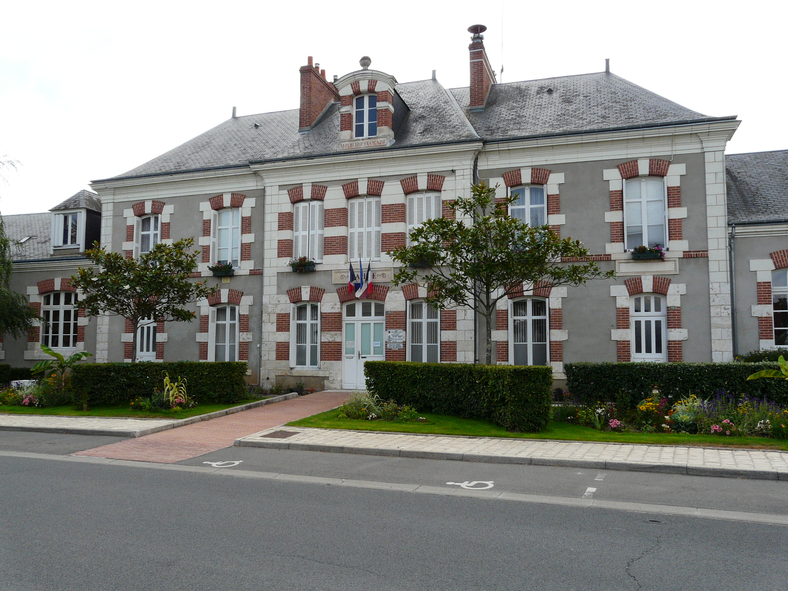 Mairie de St Gervais la foret